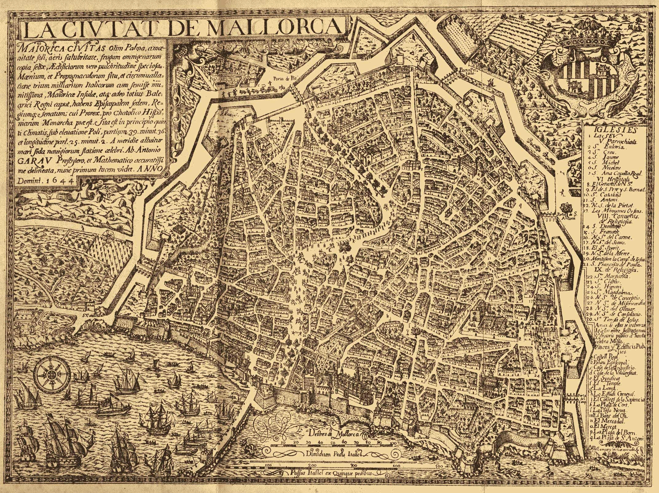 Plano de la Ciutat de Mallorca, de 1644